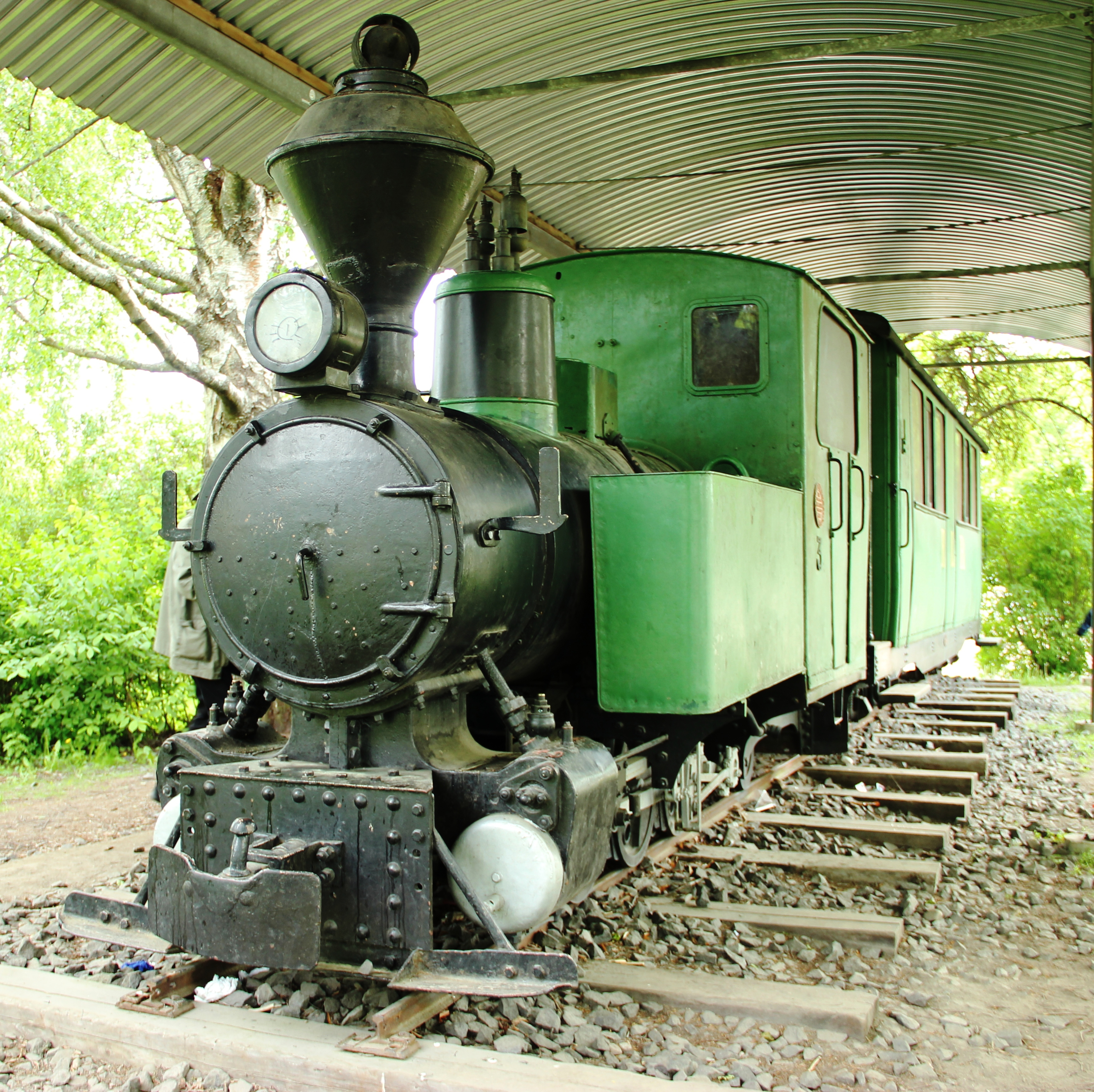 Riihimäen-Lopen rautatien museoitua kalustoa Riihimäen palolaitoksen edessä. Veturi nro 3 ja vaunu, Paloheimonkadun ja Kulmalan puistokadun kulmassa